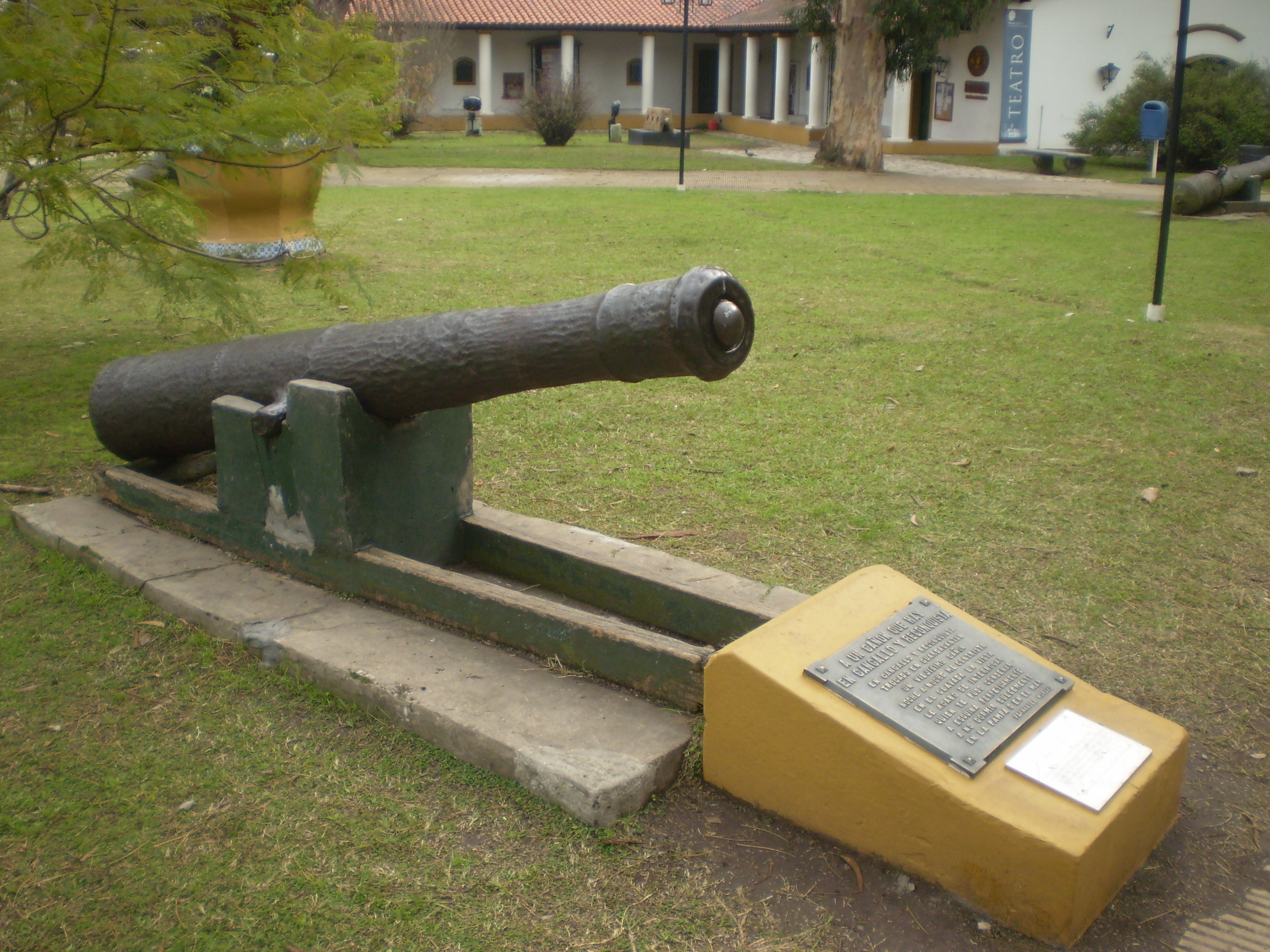 Cañon terrestre de avancarga del siglo XVIII expuesto en los jardines del Museo Histórico de Buenos Aires Cornelio de Saavedra